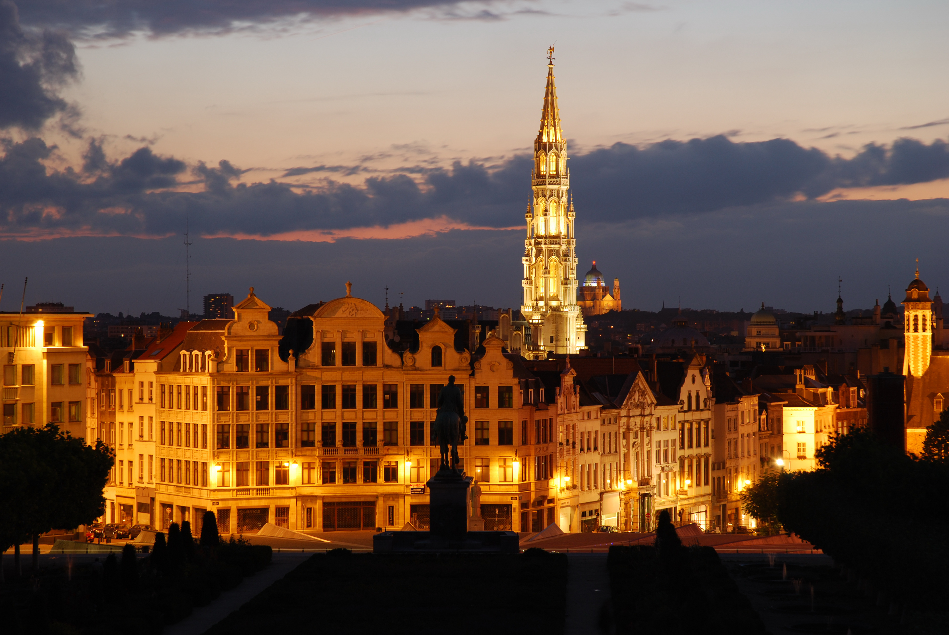 Vista panorámica de noche del centro de Bruselas Place de l'Albertine, Bruxelles (Belgique). A l'avant-plan statue du roi Albert I. Au fond flèche de l'Hôtel de ville